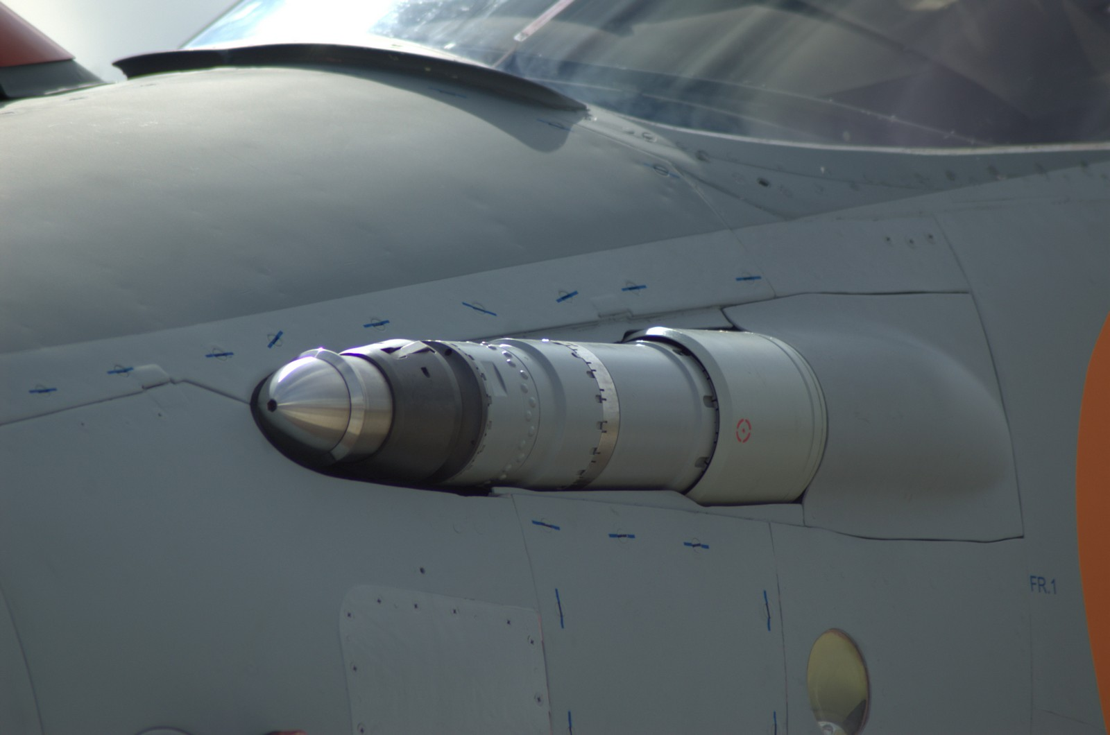 Refuelling tube